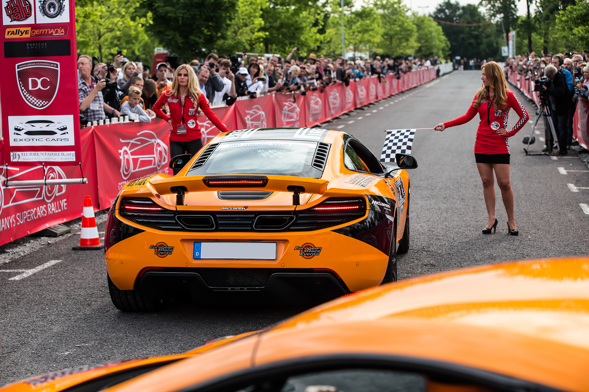 Zwei McLaren 12c mit den Startnummern 2 und 3 bei der GSR 2015. Die Fahrzeuge gehören zum Team "European Race Events".